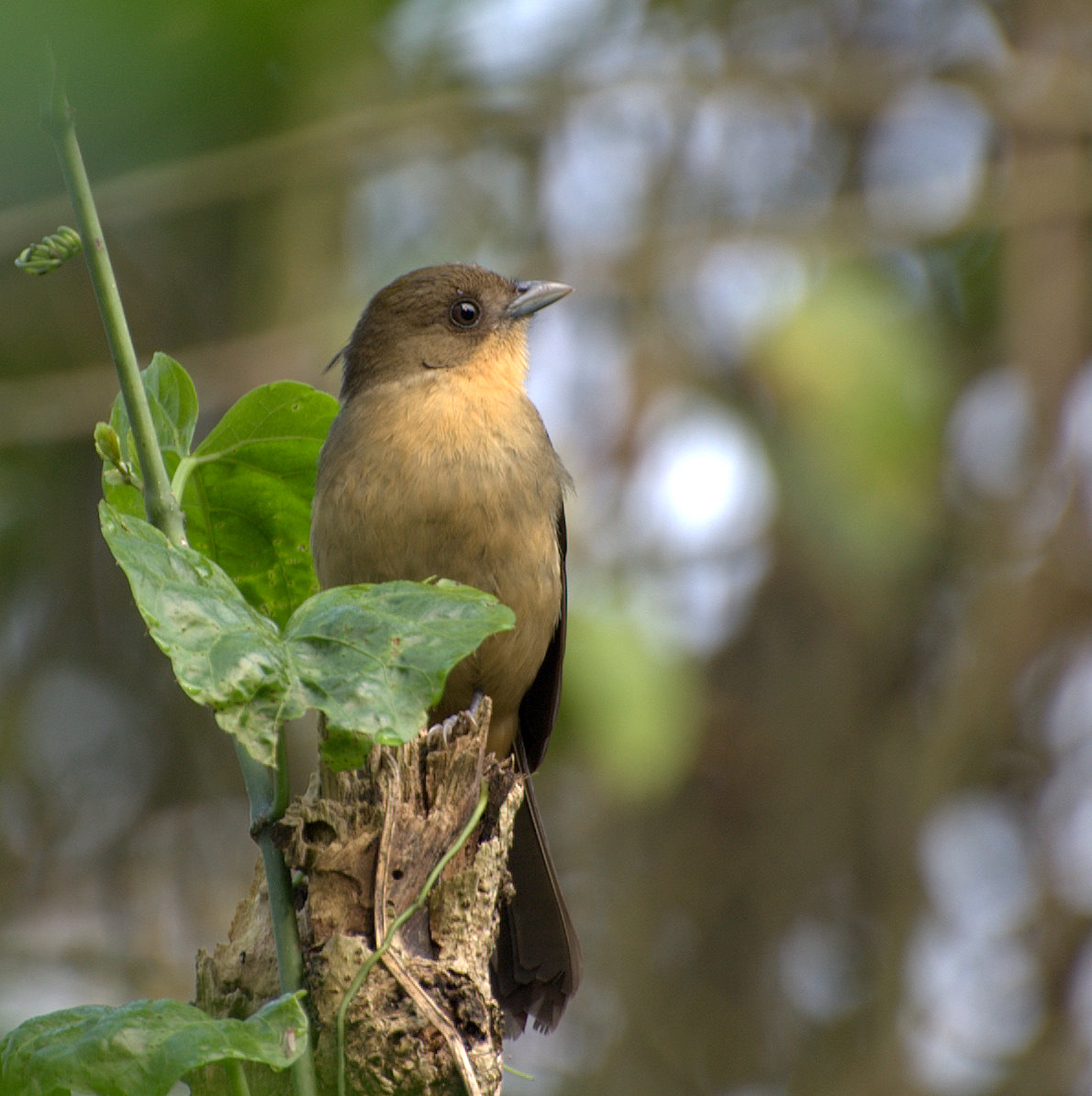 Horto Florestal de São Paulo